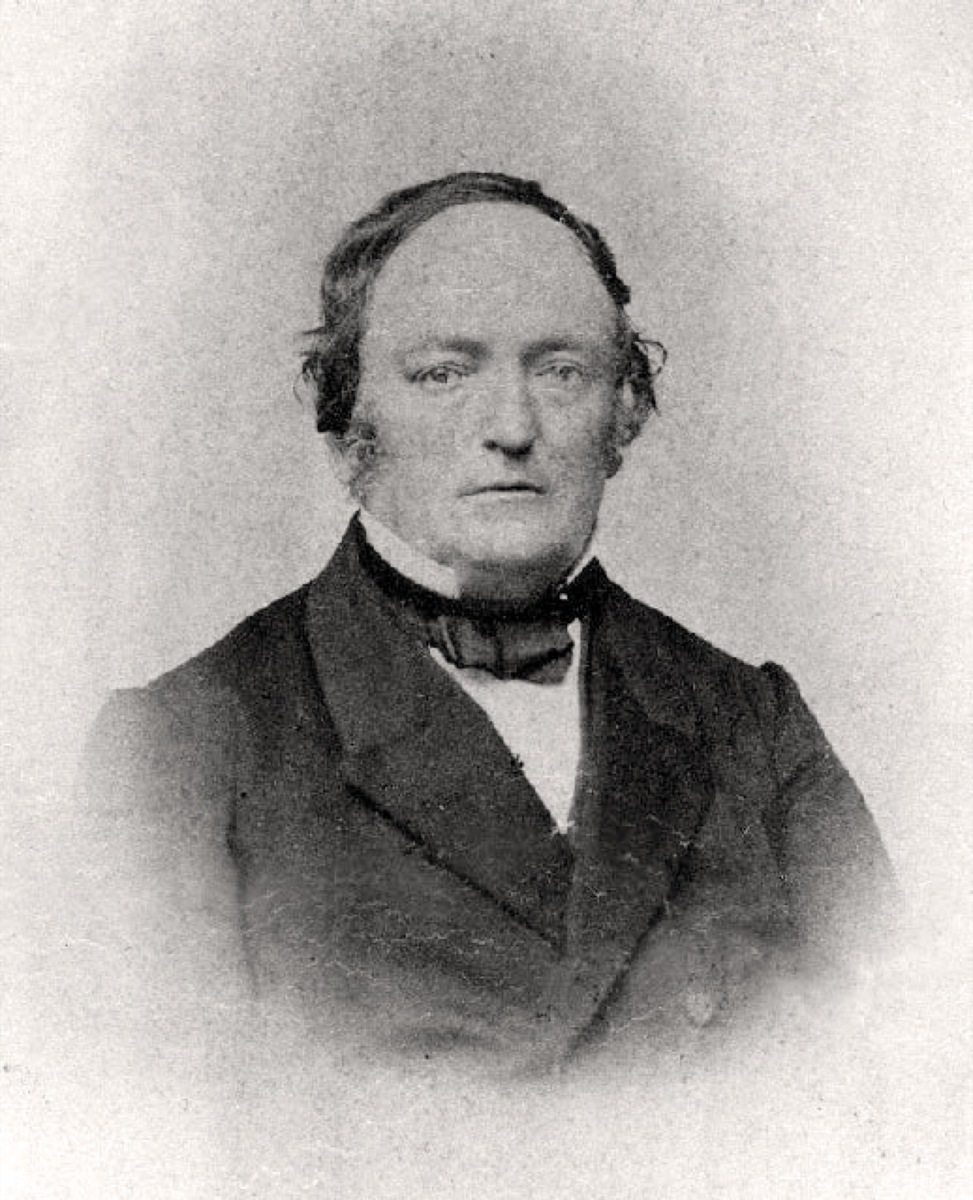 Henrik Heltberg, ca 1860